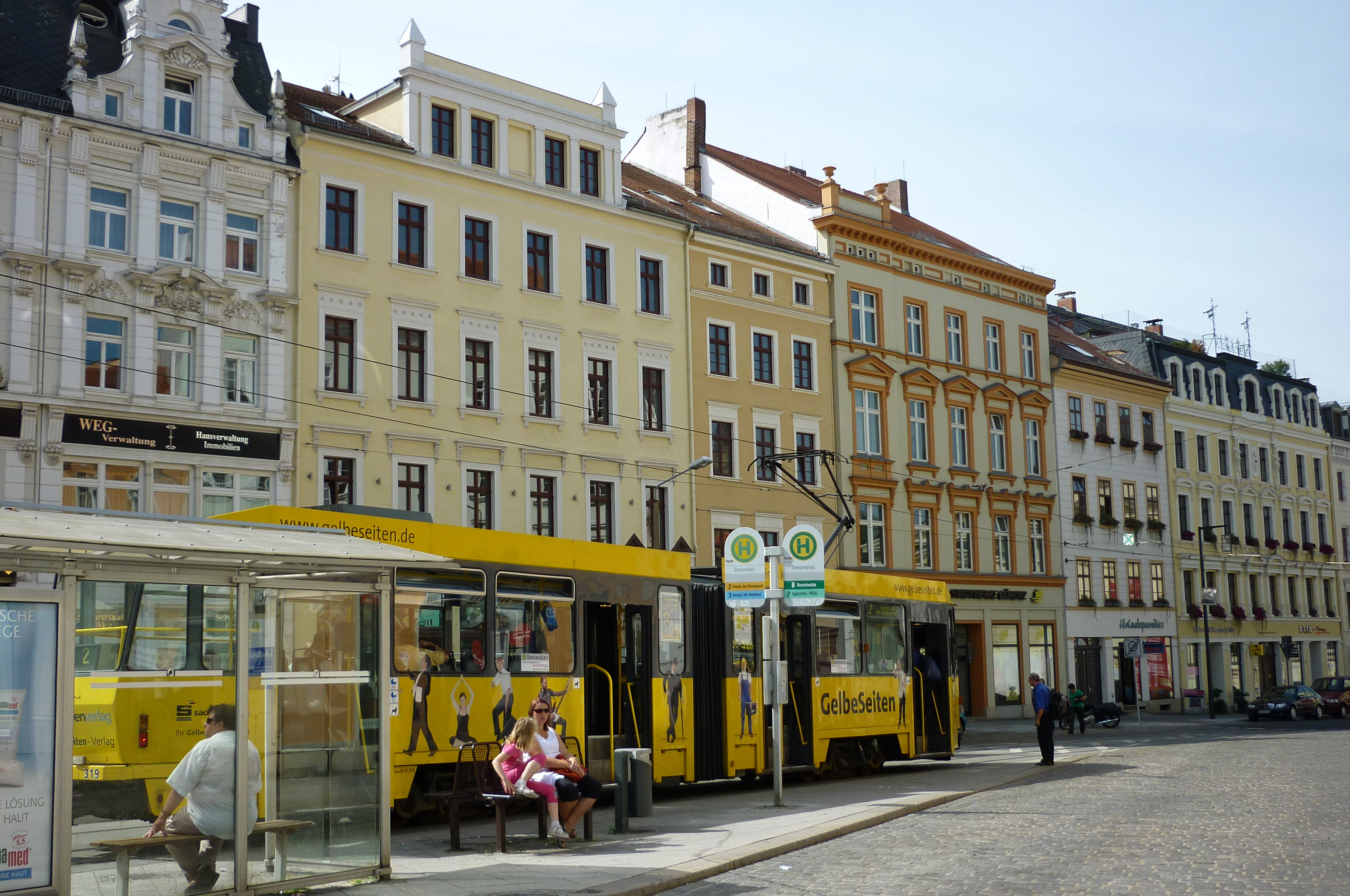 Görlitz. Straßenbahn Typ Tatra KT4 am Demianiplatz.